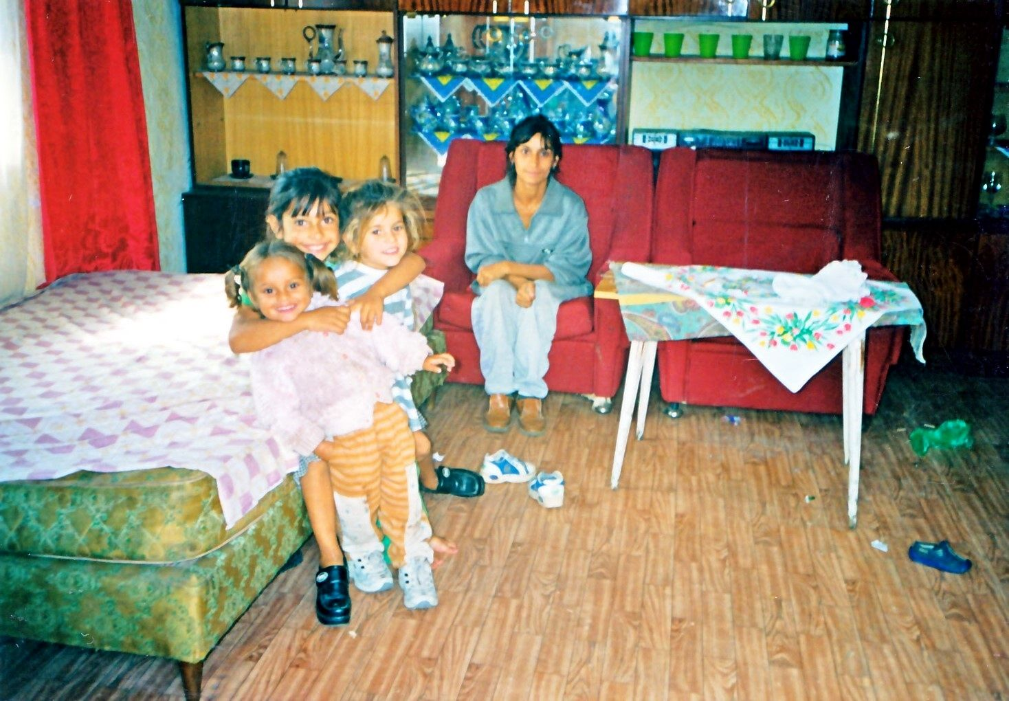 Rómovia z Letanovského mlyna, okres Sp. Nová Ves. Rok 2002